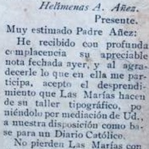 Nota del obispo del Zulia, Marcos Sergio Godoy, agradeciendo la donación de la imprenta de "Las Marías". Esta imprenta fue donada al obispado por la periodista Teresa López Bustamante, para que con ella se iniciara la edición del diario católico "La Columna".